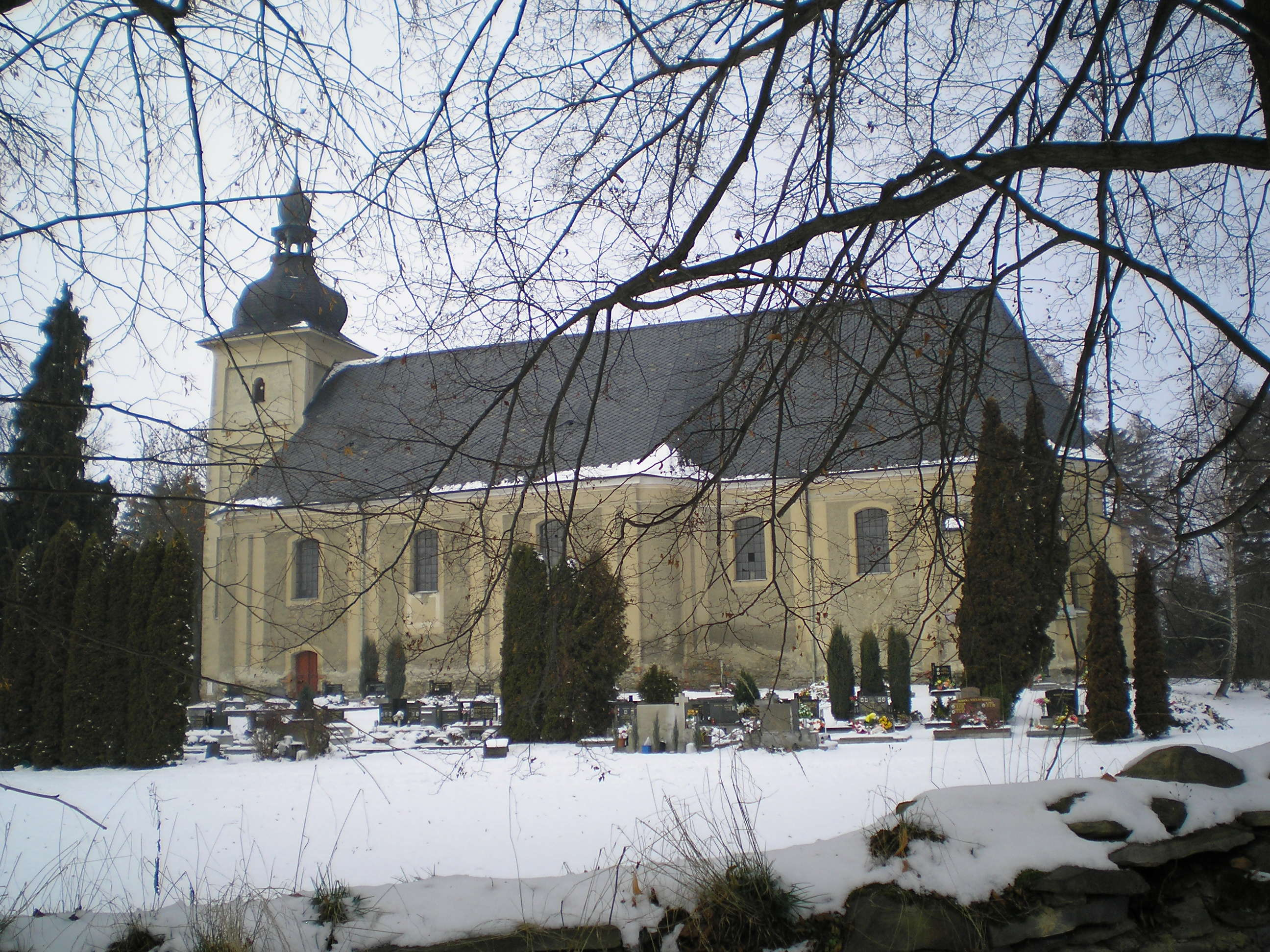 Staré Město, kostel Neposkvrněného Početí Panny Marie